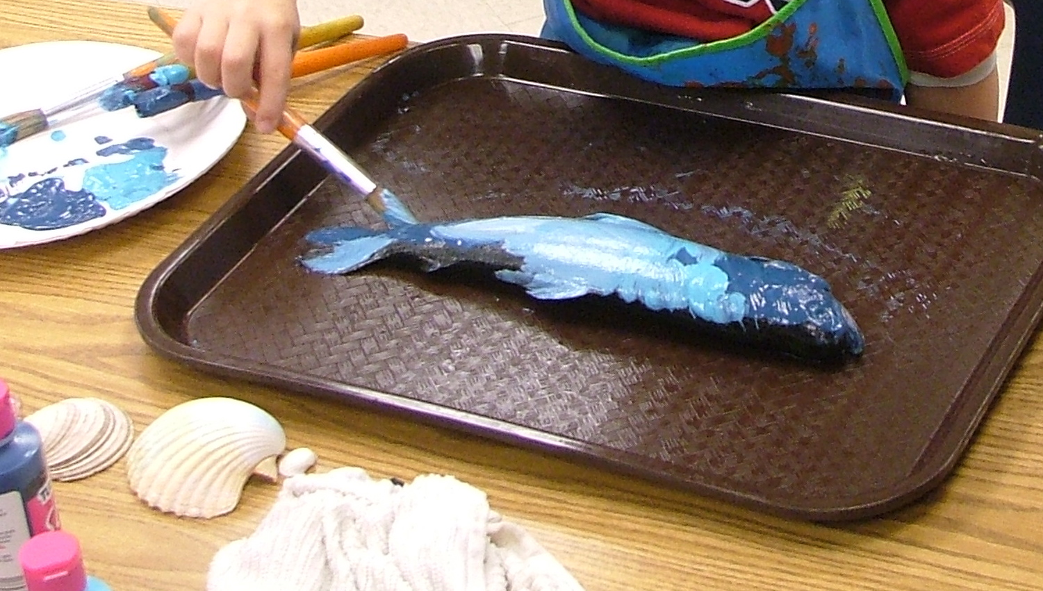 preparación de un pez para realizar un gyotaku